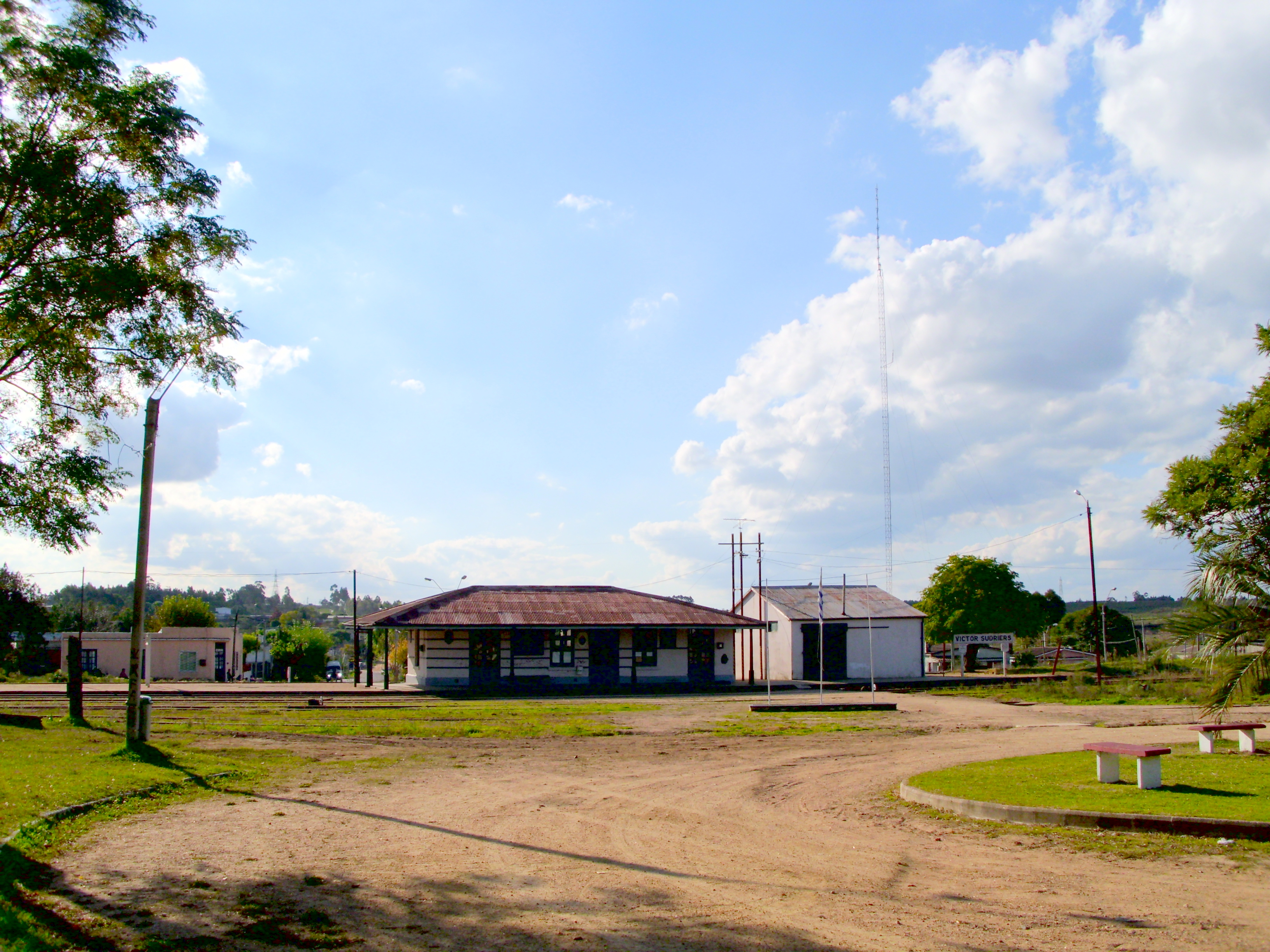 Estación Sudriers de Empalme Olmos, Canelones, Uruguay.